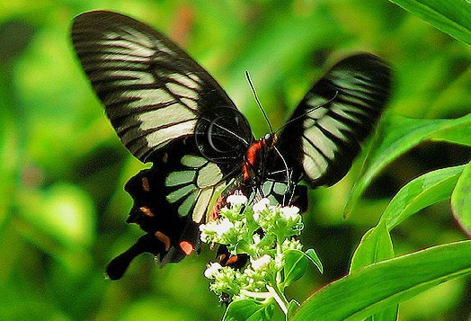 Ceylon rose